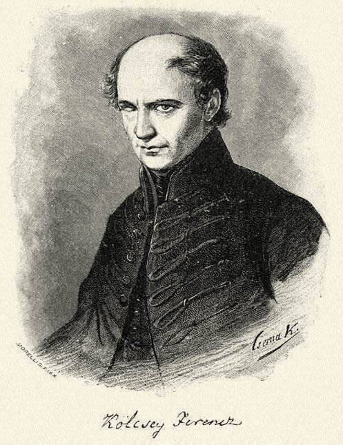 Kölcsey Ferenc. Morelli Gusztáv fametszete. Megjelent Az Osztrák-Magyar Monarchia írásban és képben (1887–1901) kiadványban